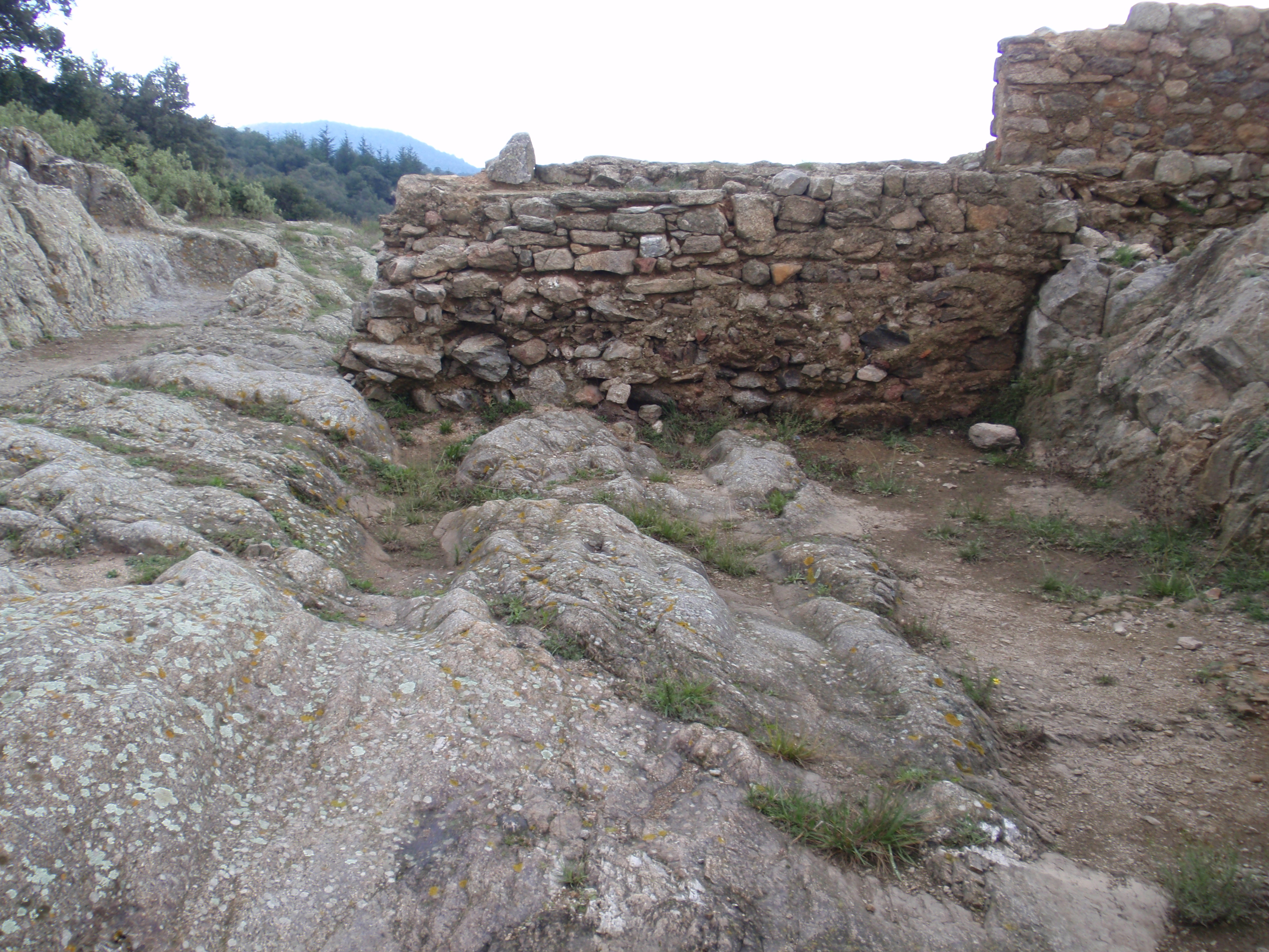 Via domitia. Jaciment arqueològic de Panissars (El Pertús, Vallespir) .